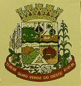 Brasão de Armas do município paranaense de Ouro Verde do Oeste, Brasil.